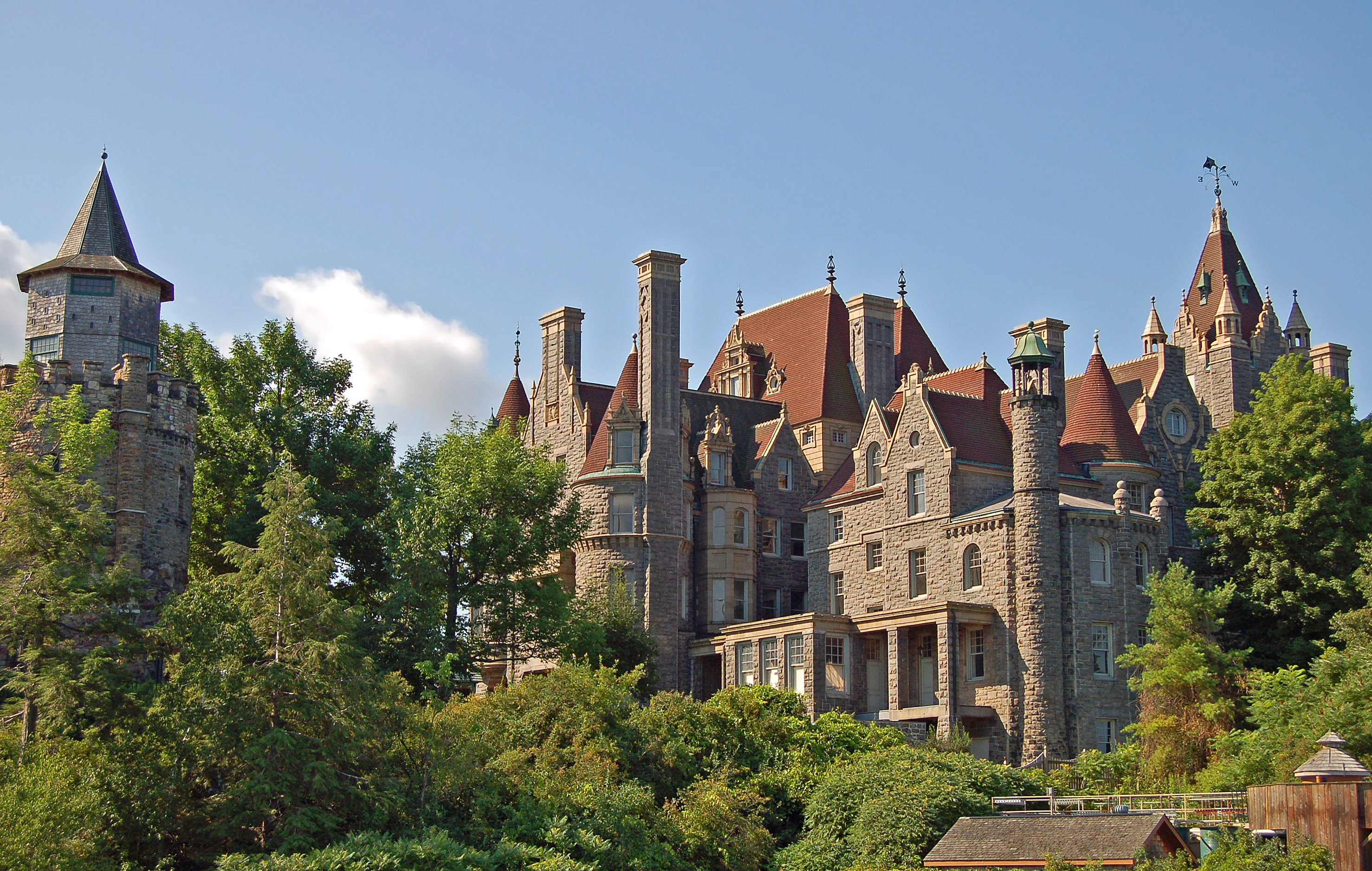 Le Château de Boldt photographié en Juillet 2008.